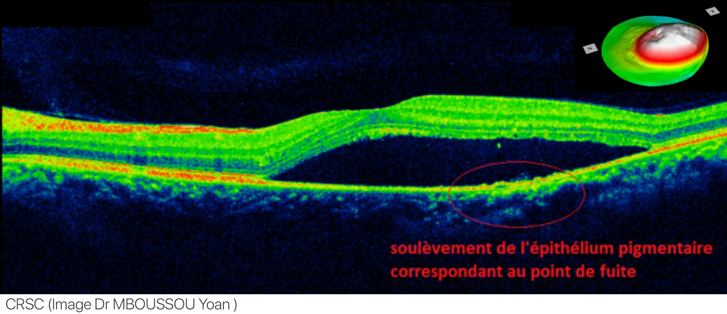 central serous chorioretinopathy